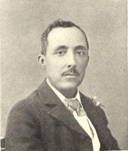 Jose Henriques Figueira (1860-1946) pedagogo y antropólogo uruguayo.